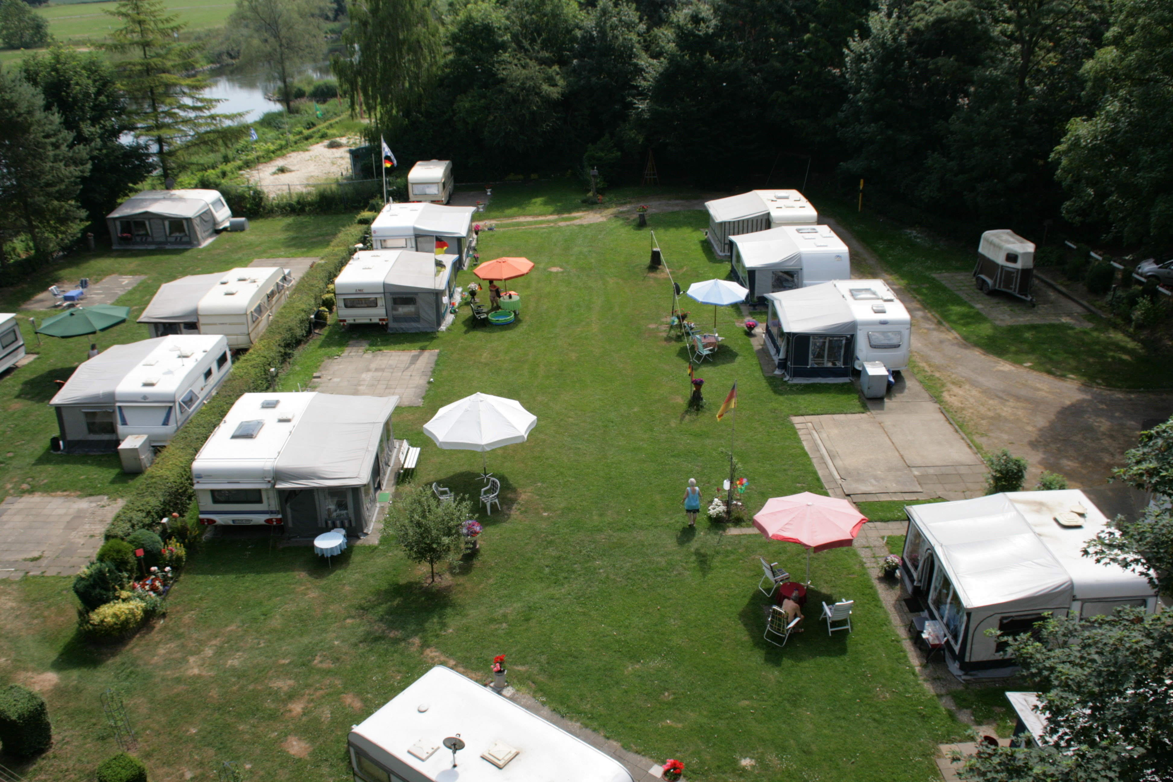 Blick nach Hattingen auf der Ruhrbrücke Kosterstraße zwischen Hattingen und Bochum-Stiepel